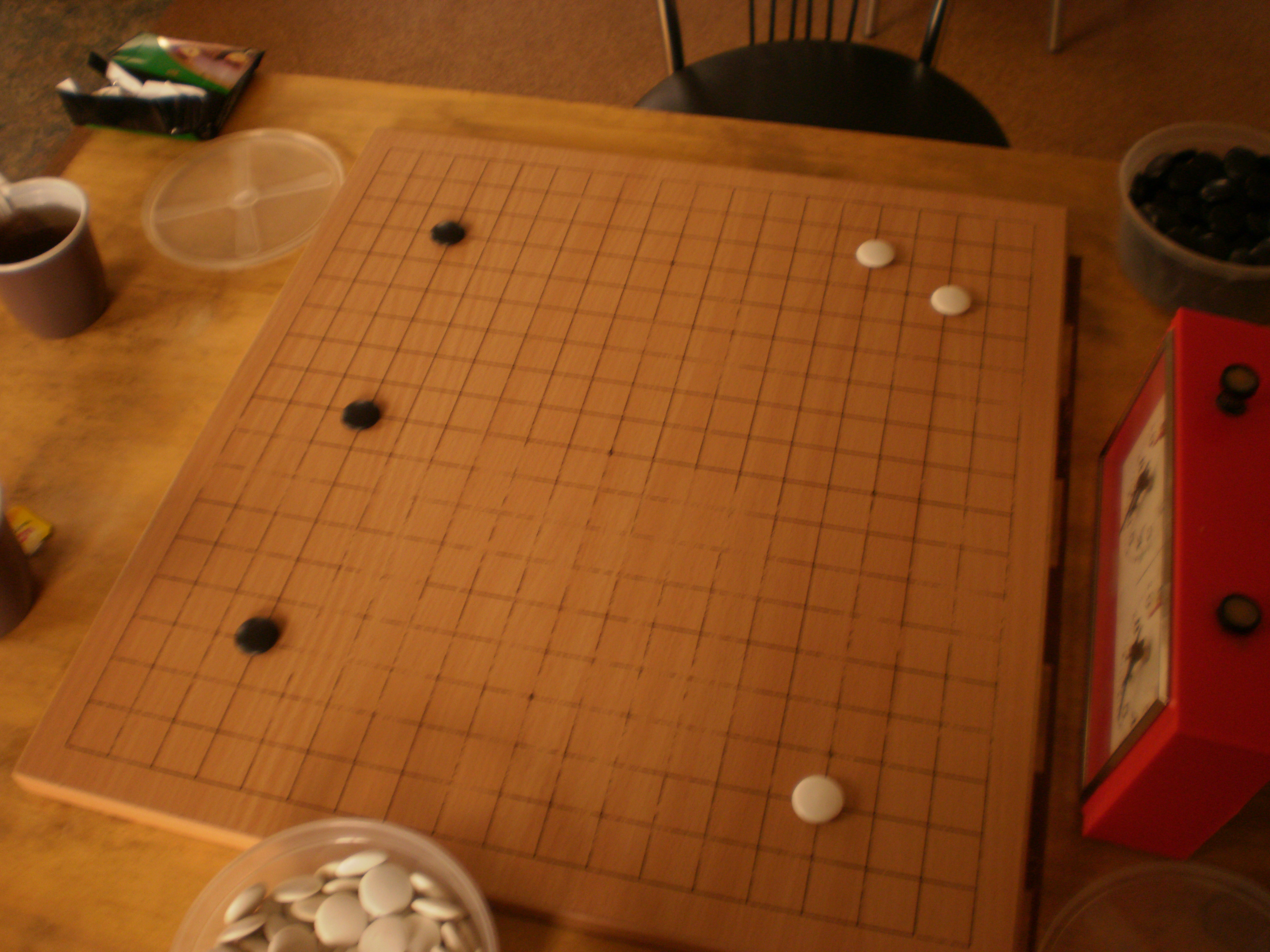 Партия с чемпионата Ярославля по го 2011